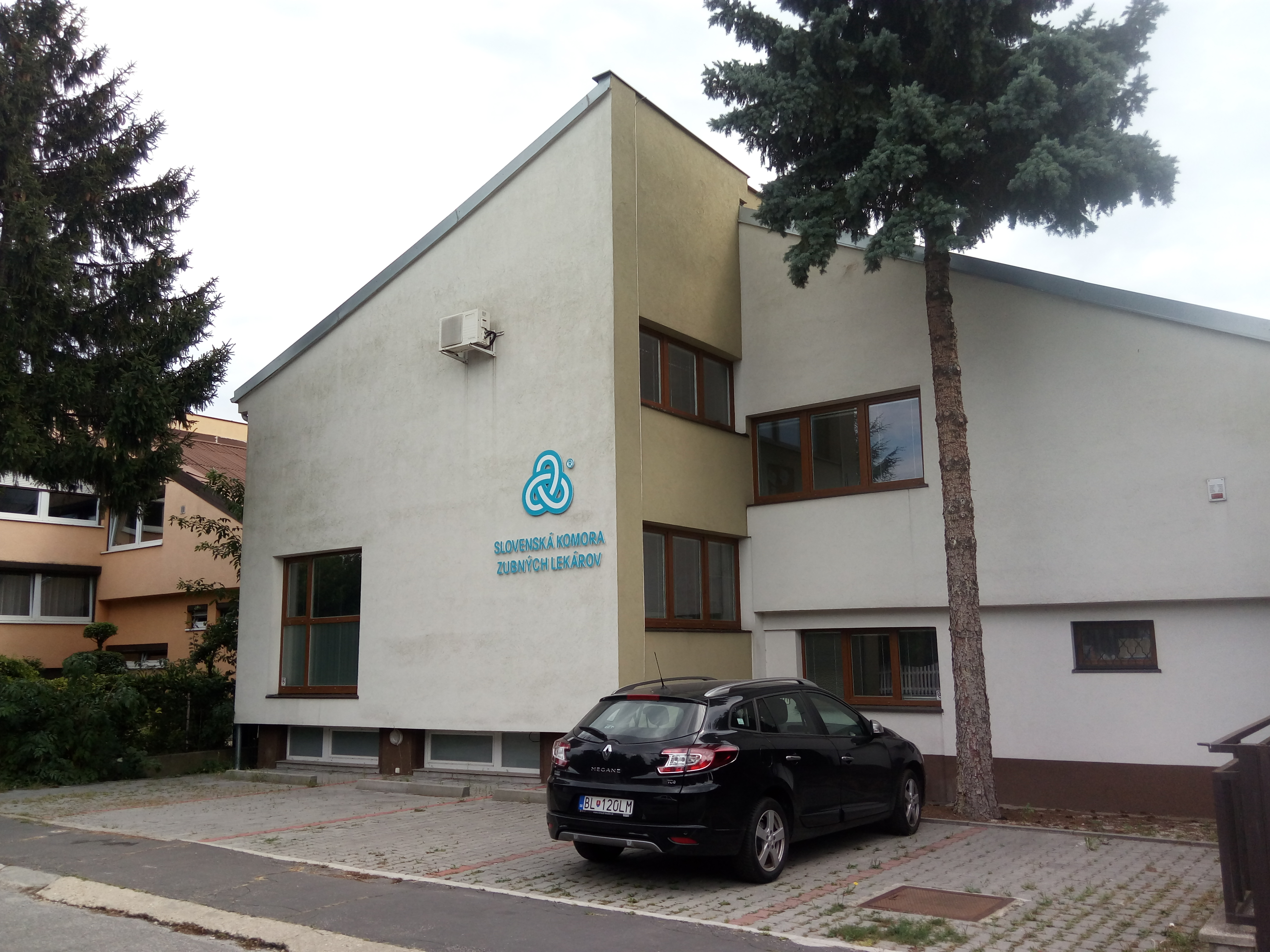 Fibichova 14, Ružinov, Bratislava